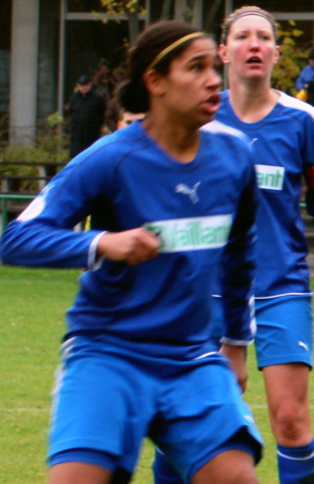 FFC Wacker München gegen FC Köln. Zweite Bundesliega Süd. Ergebnis 1 : 4.